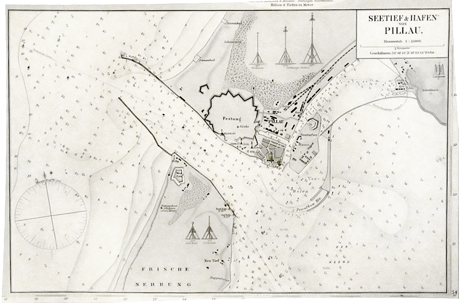 Seekarte Pillau von 1880 (im Kulturzentrum Ostpreußen Ellingen)